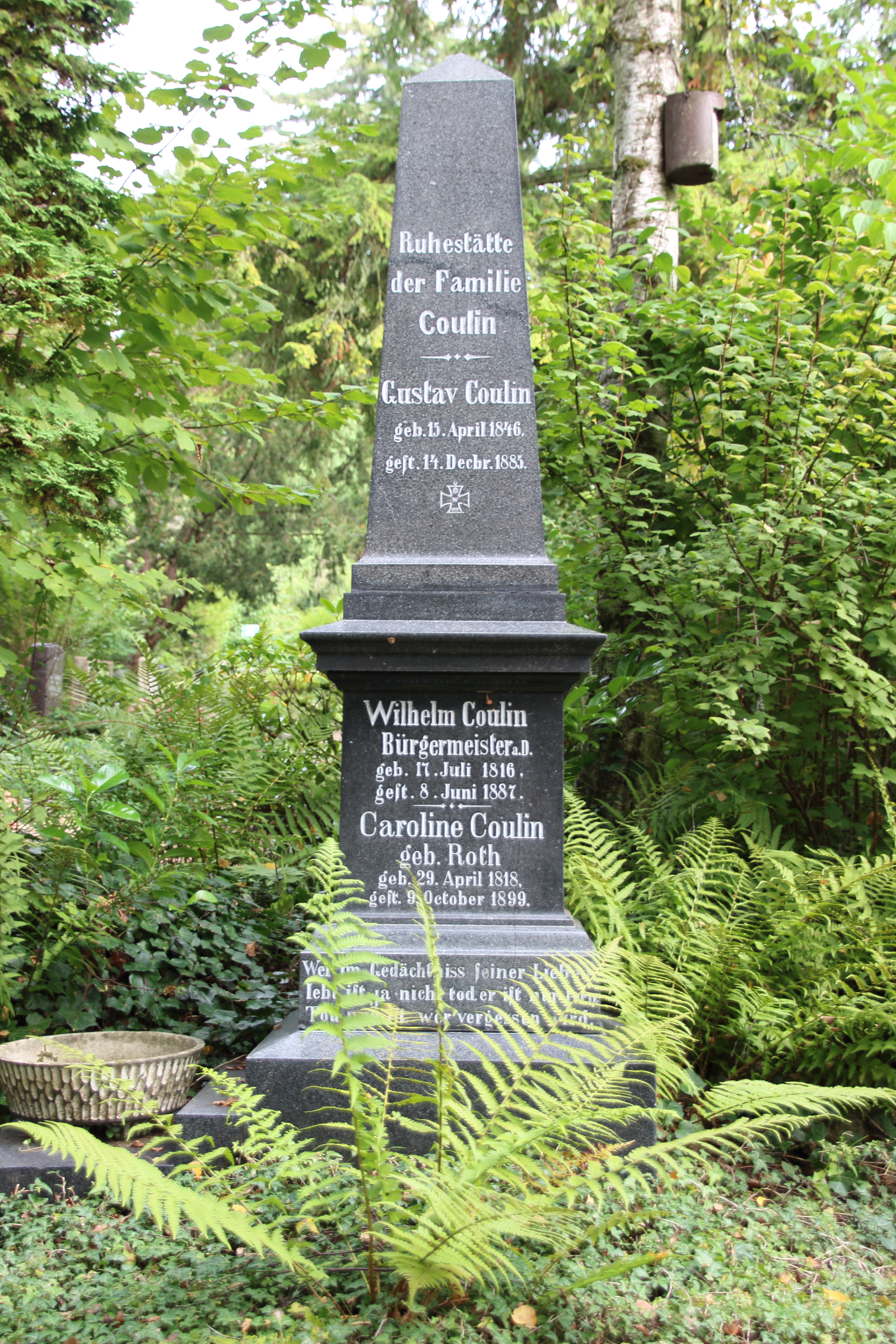 Ruhestätte der Familien Coulin: Wilhelm Coulin (1816-1887)(Bürgermeister von Wiesbaden), Caroline Coulin geb. Roth (1818-1899), Gustav Coulin (1846-1885). Nordfriedhof Wiesbaden.